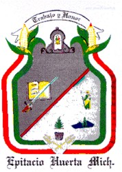 Stemma Epitacio Huerta - Michoacán